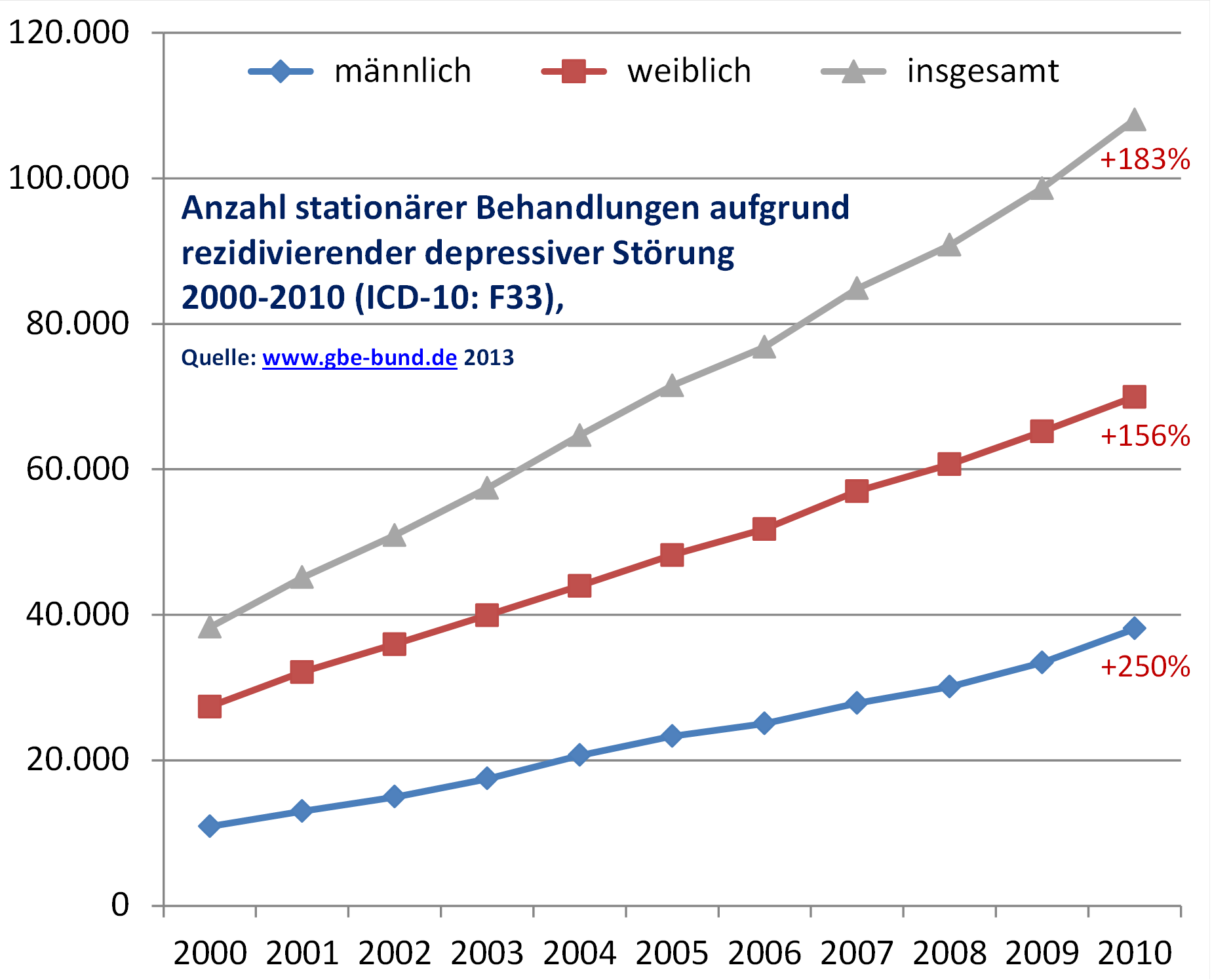 Anzahl stationärer Behandlungen aufgrund rezidivierender depressiver Störung �2000-2010 (ICD-10:F33),� Quelle: 2013